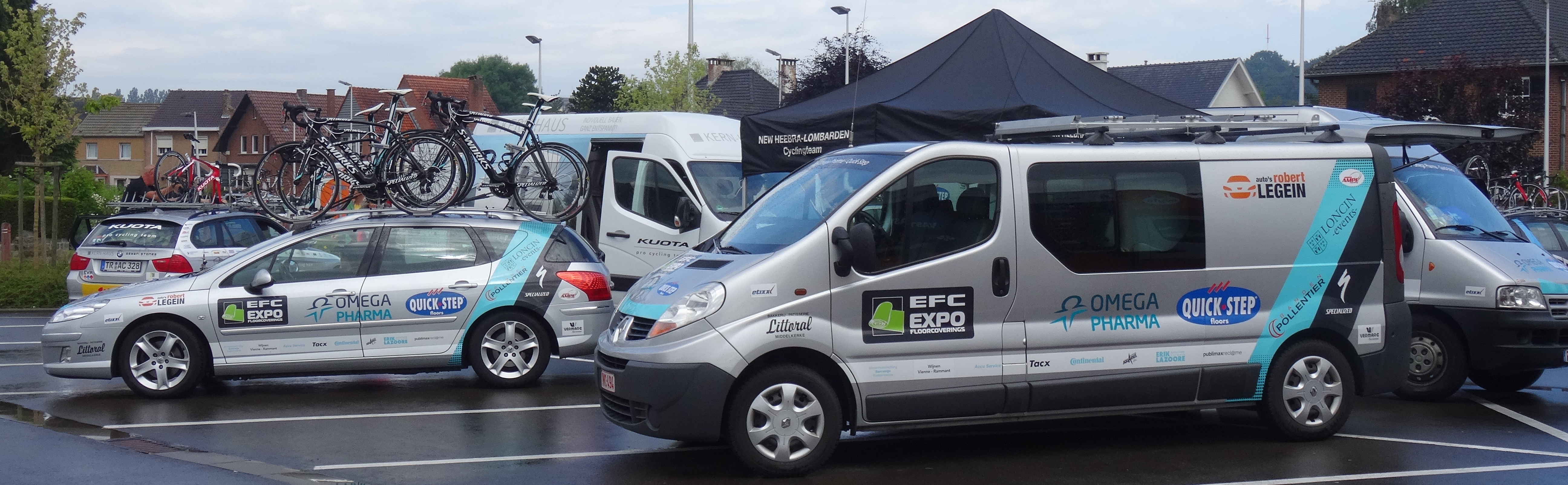 Reportage photographique réalisé le dimanche 8 juin à l'occasion du départ du Mémorial Philippe Van Coningsloo 2014 à Wavre, Belgique.